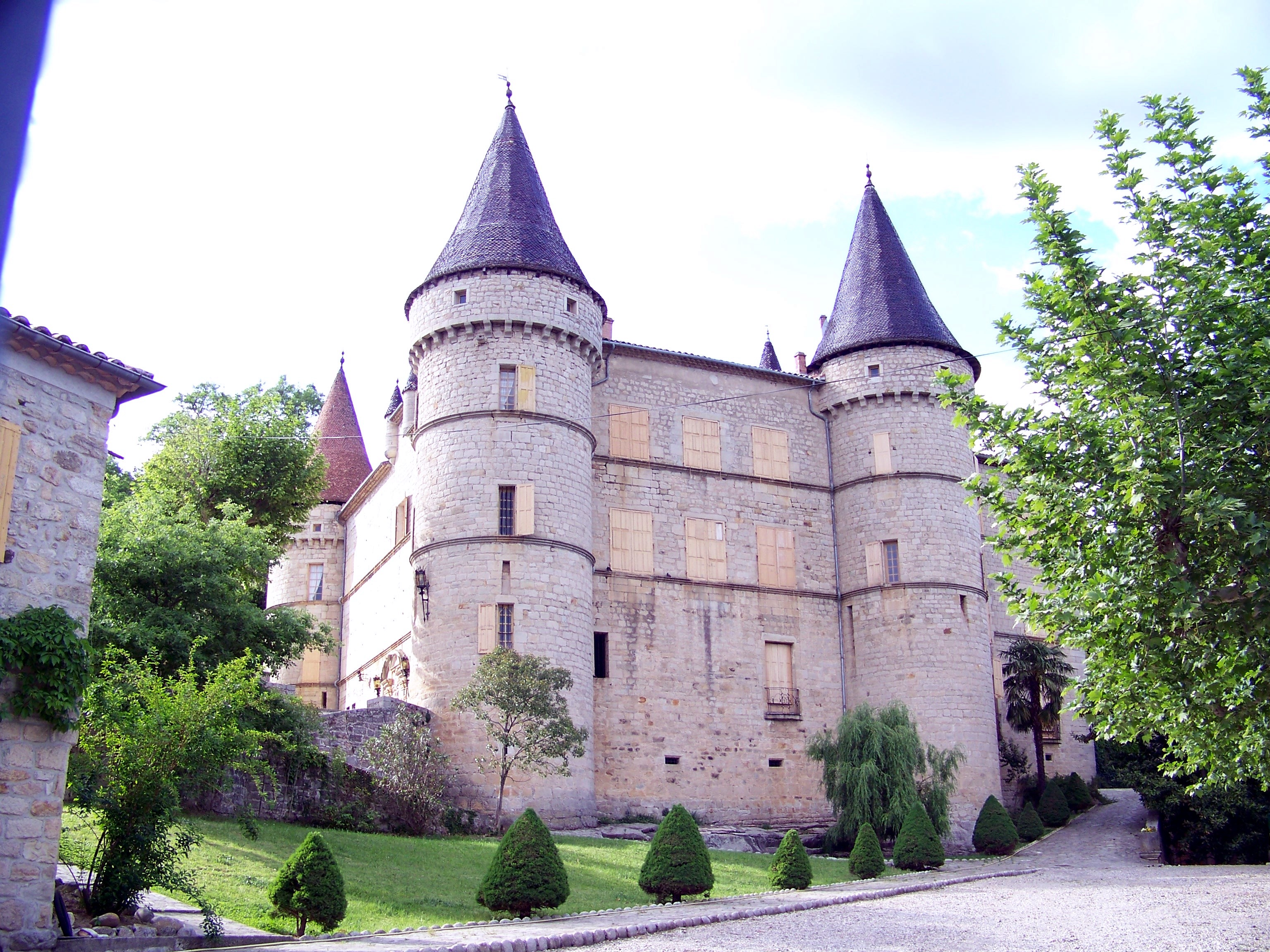 Chambonas dans le département français de l'Ardèche : Château de Chambonas.